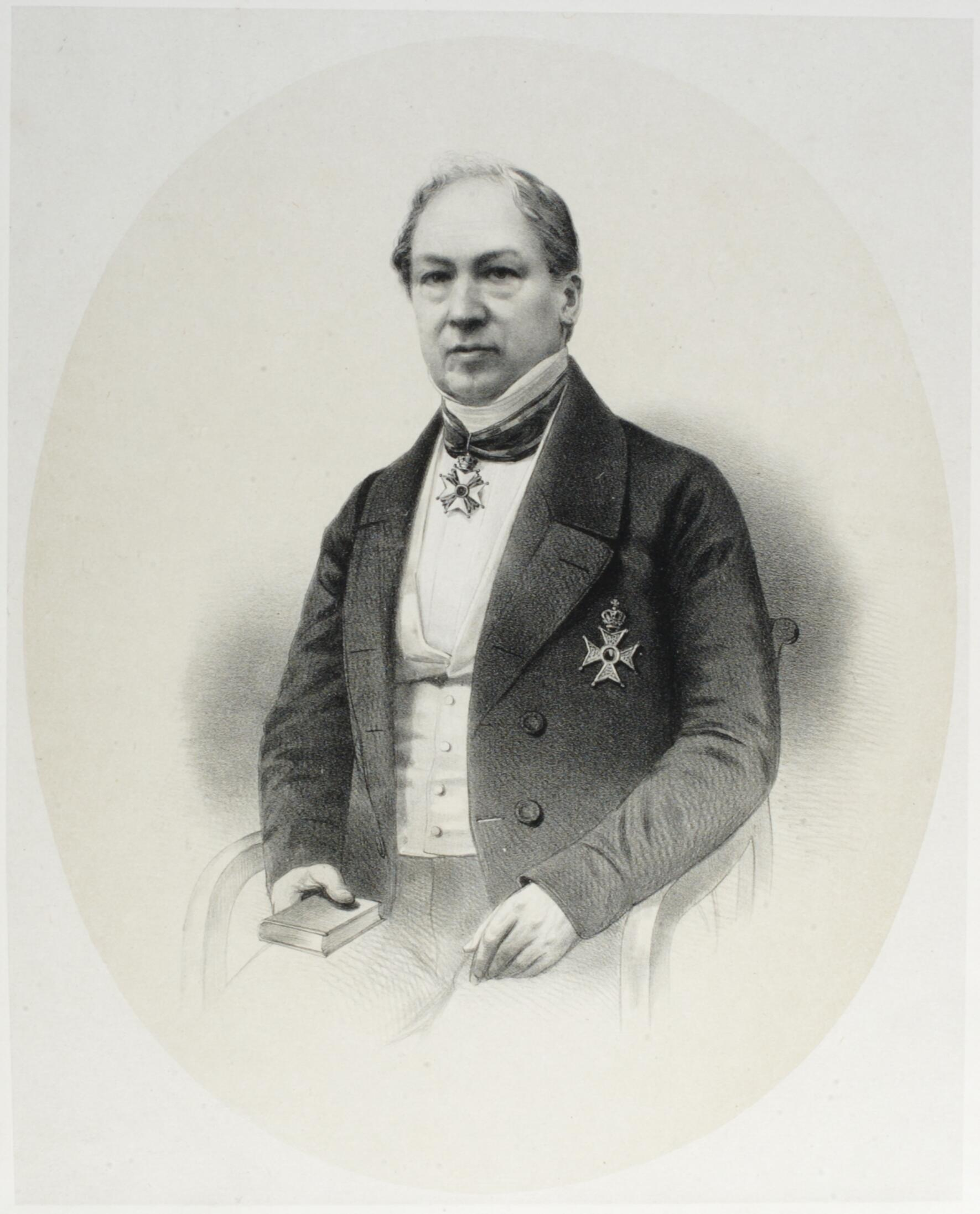 Portret van Johan Antoni Philipse (1800-1884)